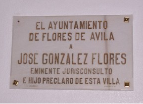 Placa de Homenaje a José González Flores